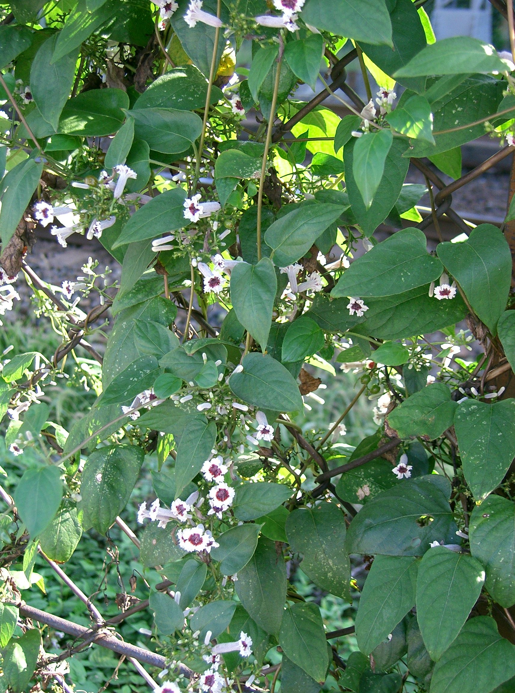 Paederia scandens